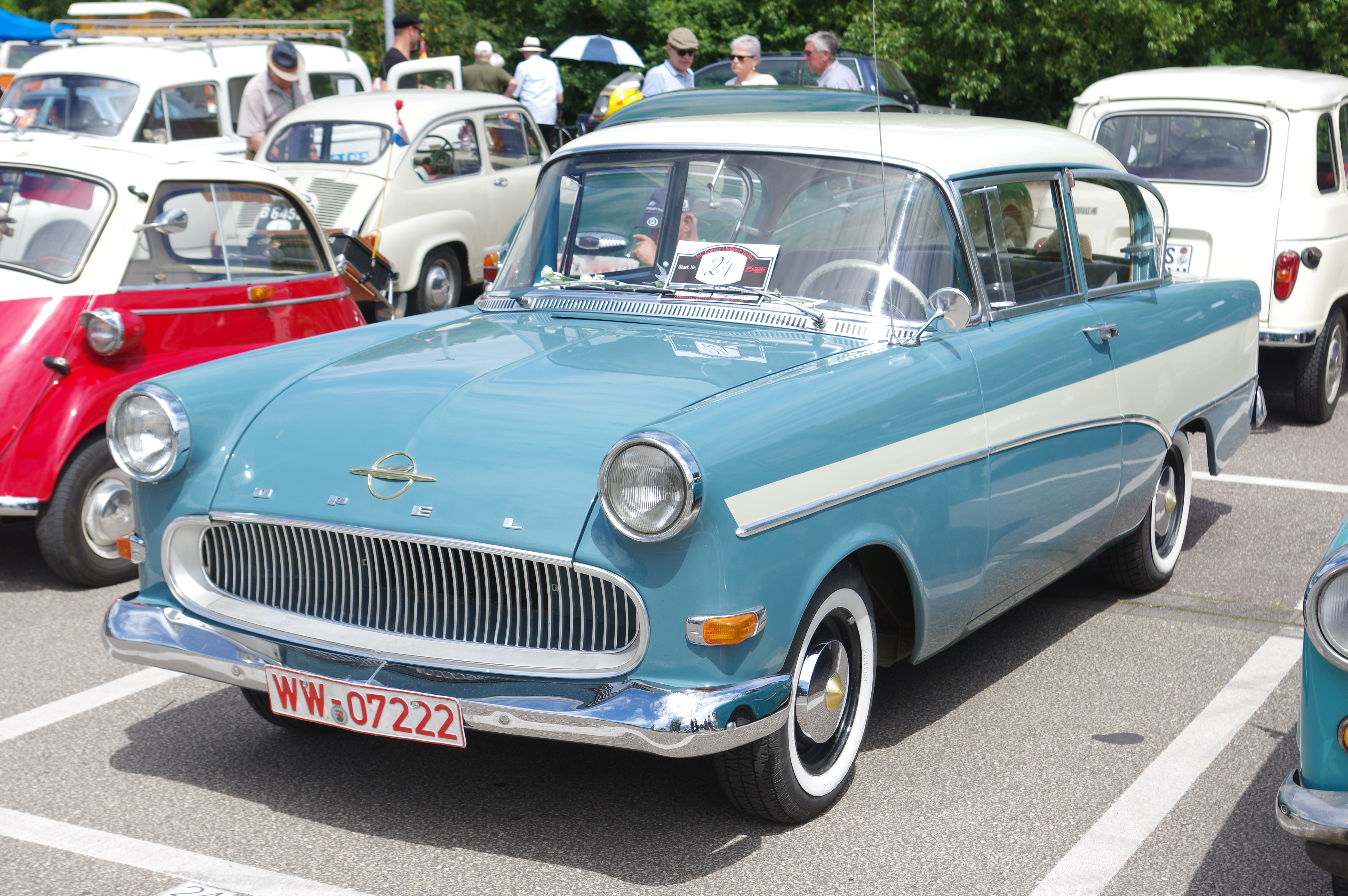 Opel Rekord P1, 1959, 45 PS , 32. Internationales Oldtimer Treffen Konz 2016, Das Nummernschild ist verfälscht!